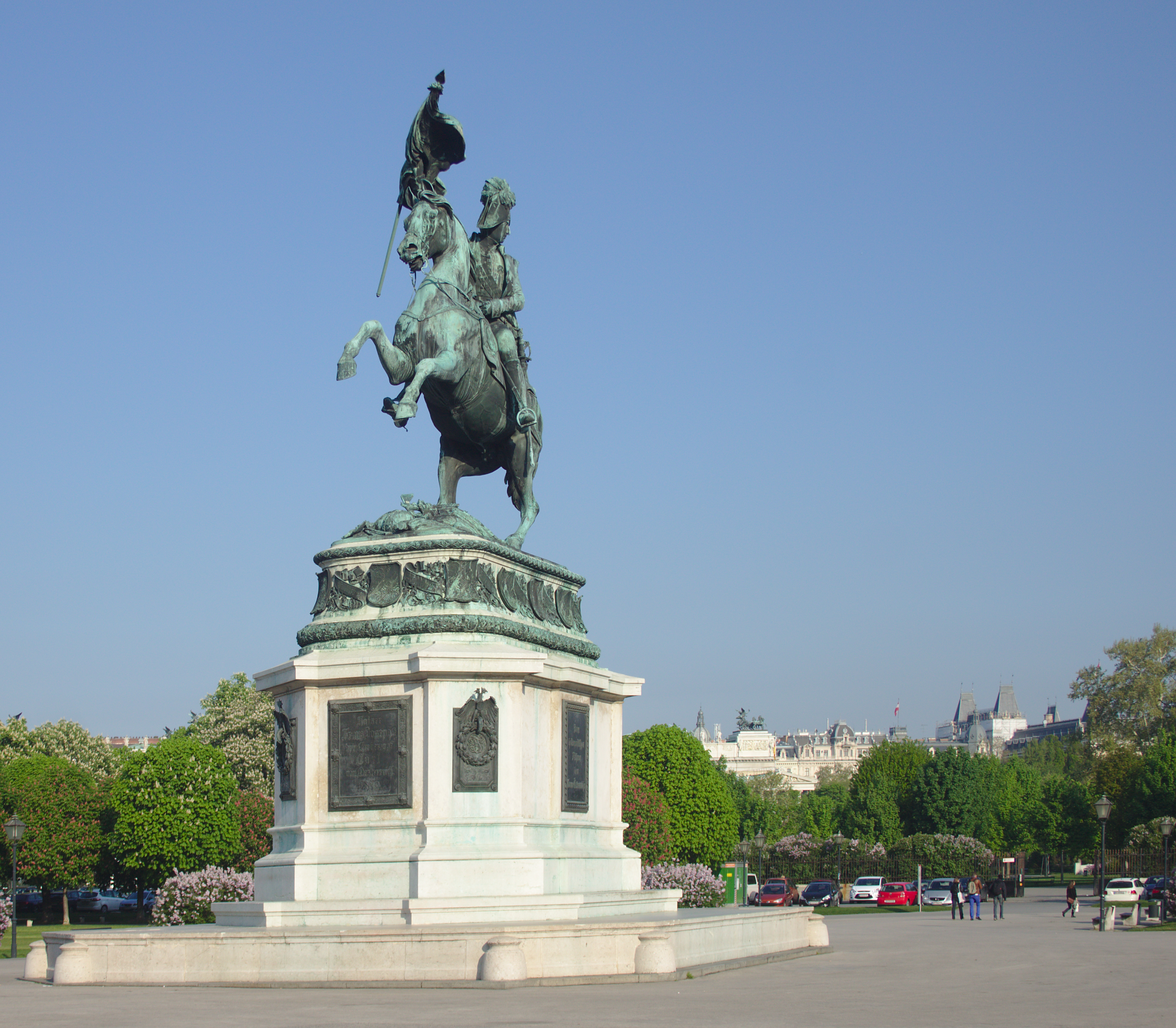 Erzherzog Karl-Denkmal